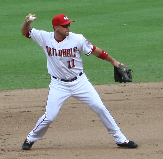 Ryan Zimmerman